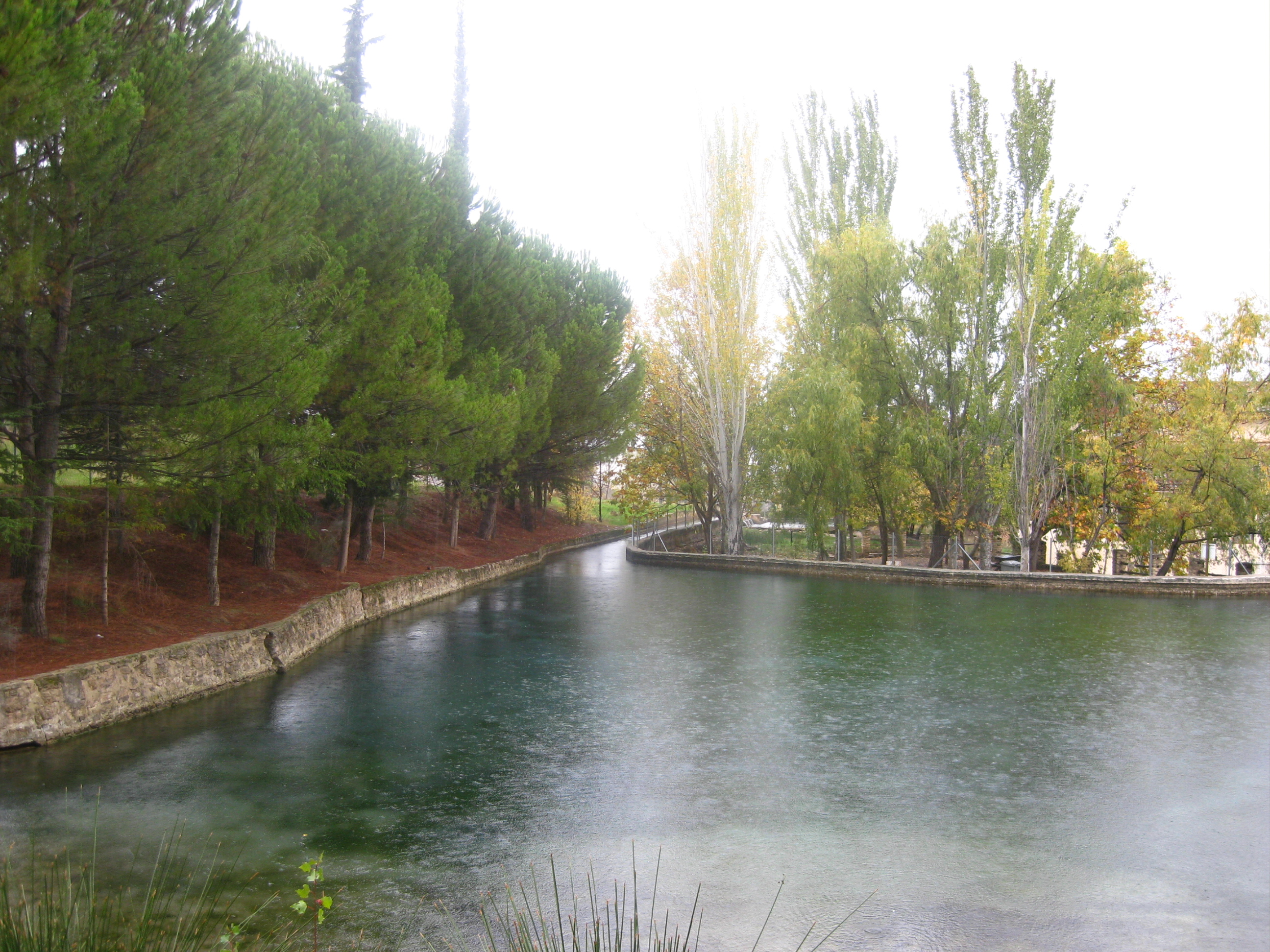 Paraje de El Nacimiento. Octubre de 2012